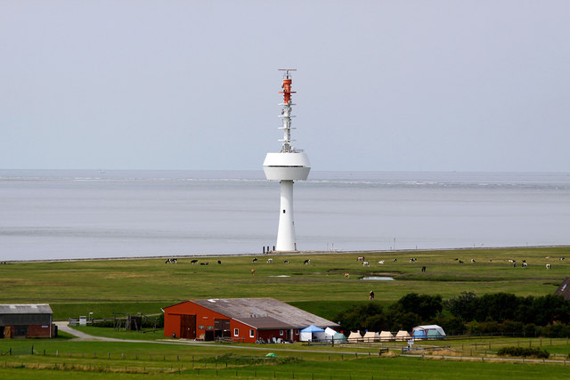 Insel Neuwerk (Hamburg), Blick vom Leuchtturm Neuwerk zum Funkturm Neuwerk